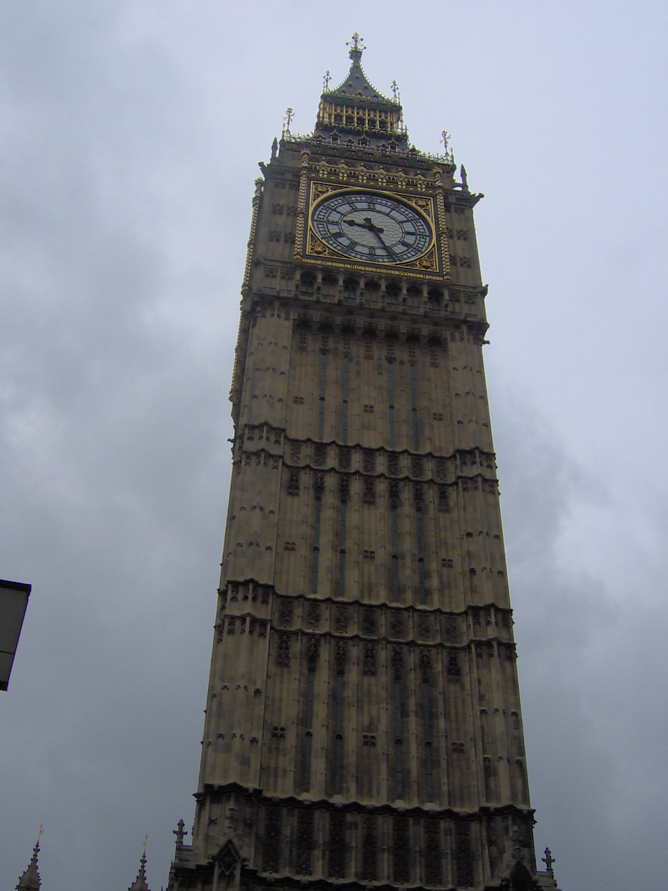 Erzsébet-torony, Big Ben (London, Egyesült Királyság)